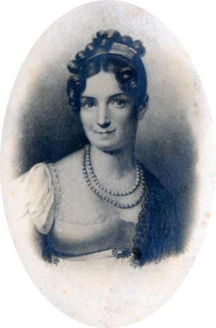 Portret van Catharina Frederica de Bruin (1783-1831) gehuwd met Claudius Pieter Gevers (1770-1836)